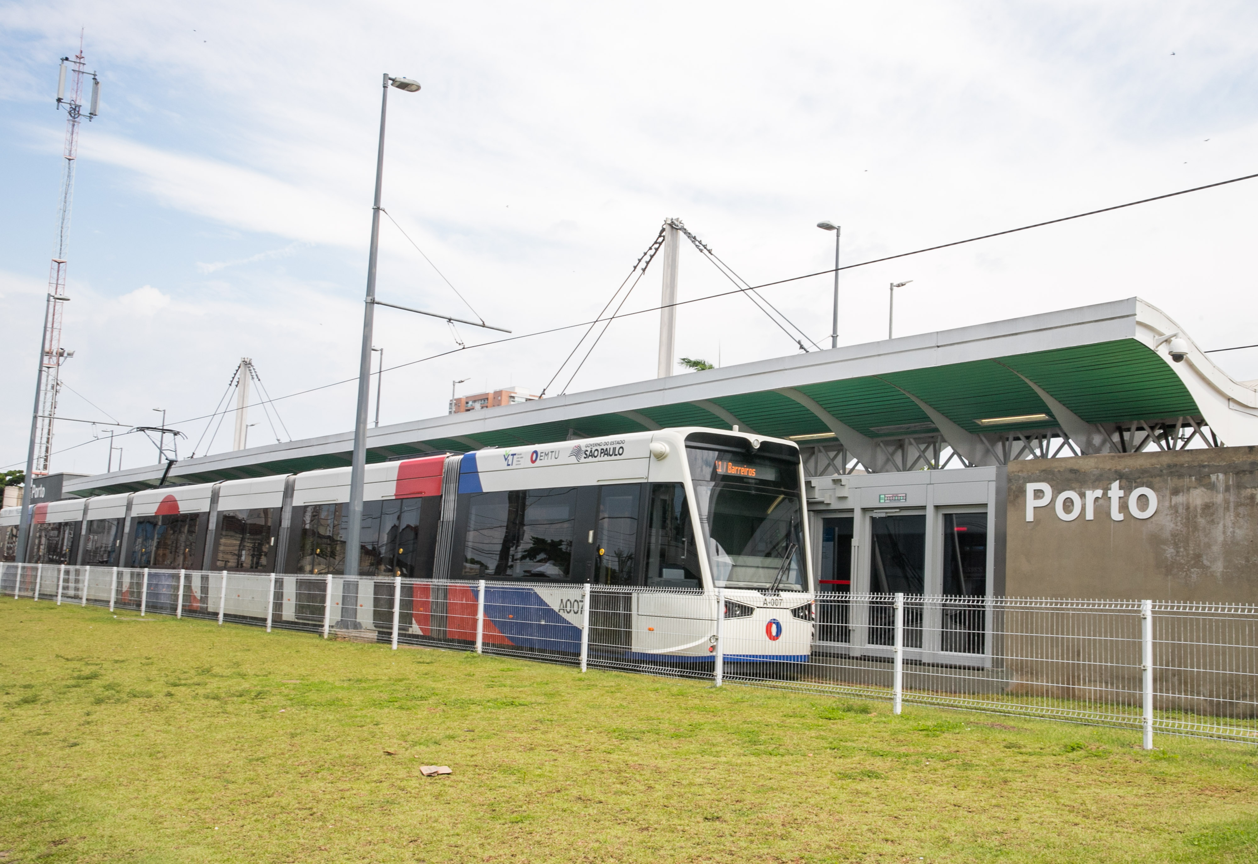 galeria13